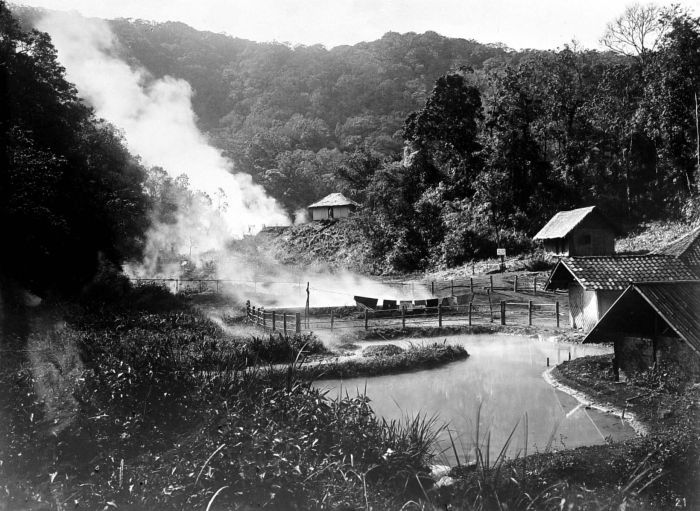 Repronegatief. Badhuizen bij zwavelbaden in een oude kraterbodem van Kawah Kamodjang op de vulkaan Goentoer, West-Java